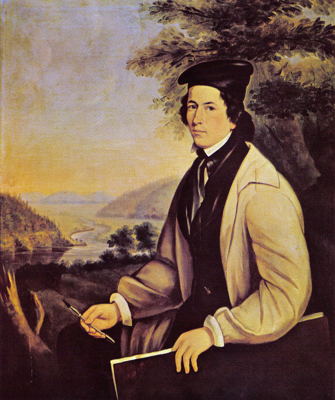 Self-portrait